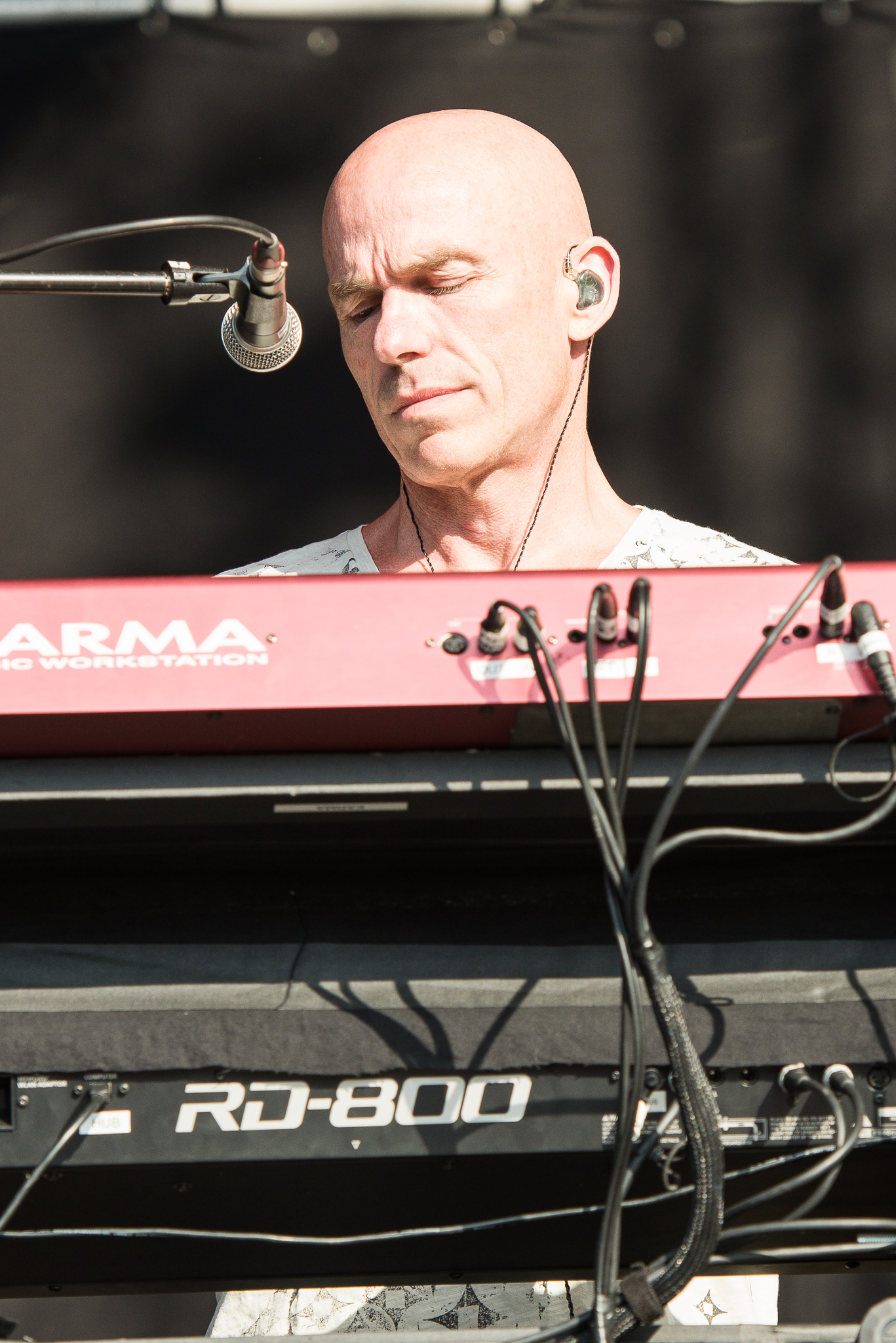 Brombachsee,Concertbüro Franken,Festival,Konzert,Lieder am See,Livekonzert,Livemusik,Marillion,Mark Kelly,Musik